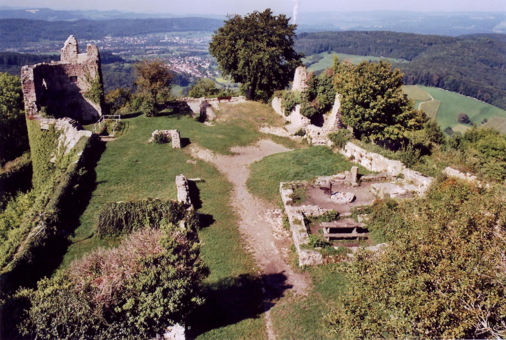 Küssaburg, Kernburg in Richtung Westen